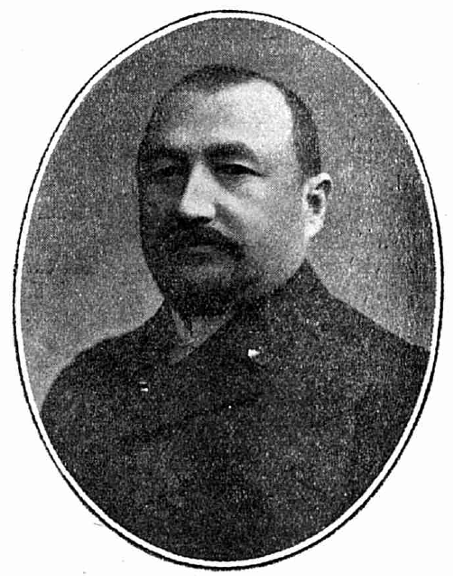 Mihail Orleanu - ministrul industriei şi comerţului, (România), 1910